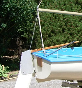 Heck einer Piaf-Jolle: Großschot und Skeg sind erkennbar. (Das Ruderblatt ist nicht vollständig niedergeholt.)